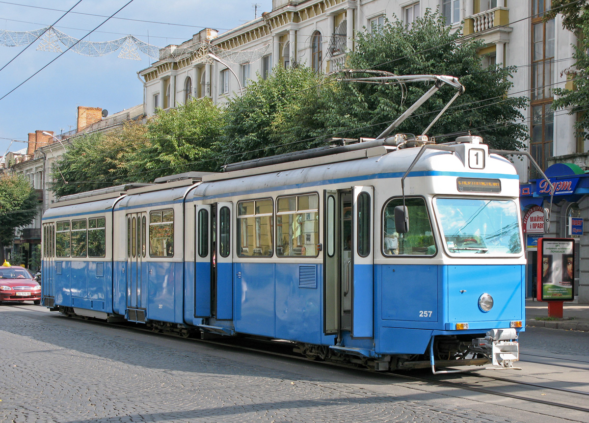 Lenins'kyi District, Vinnytsia, Vinnyts'ka oblast, Ukraine